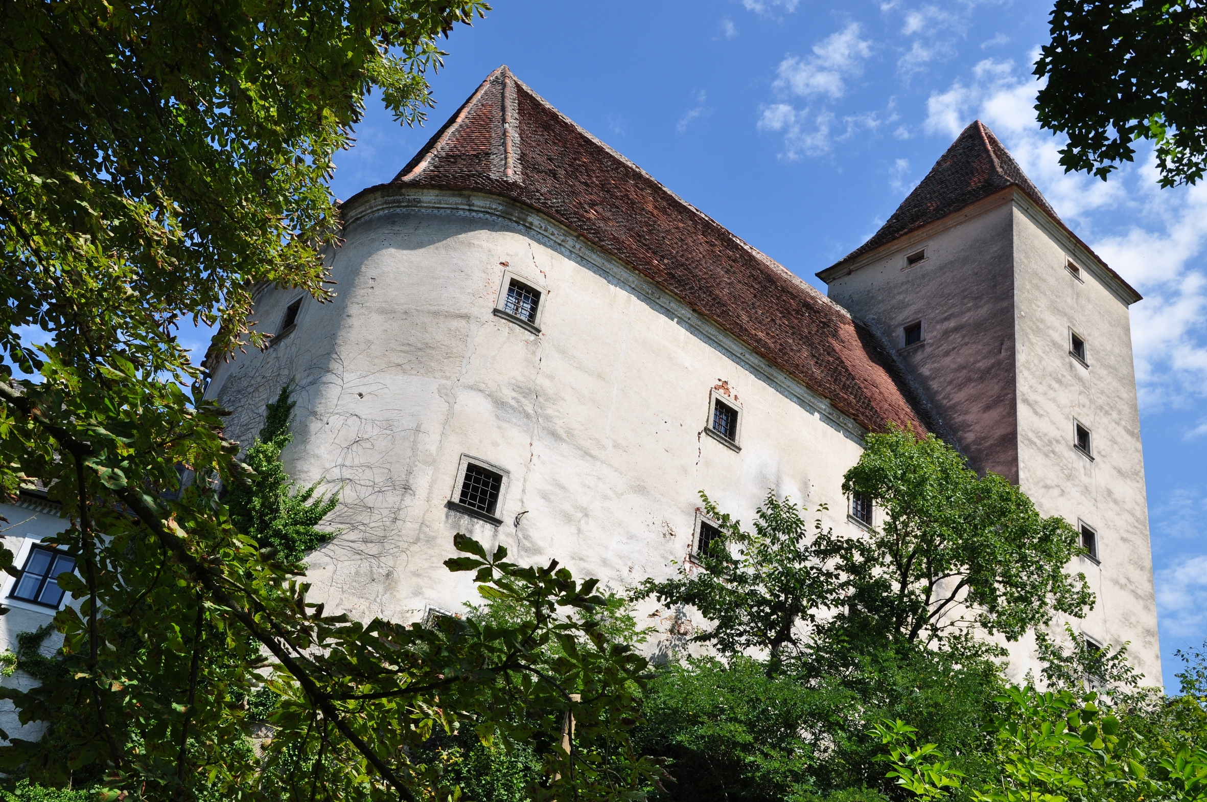 Hochburg Hausenbach, Hausenbach, Gemeinde karlstetten